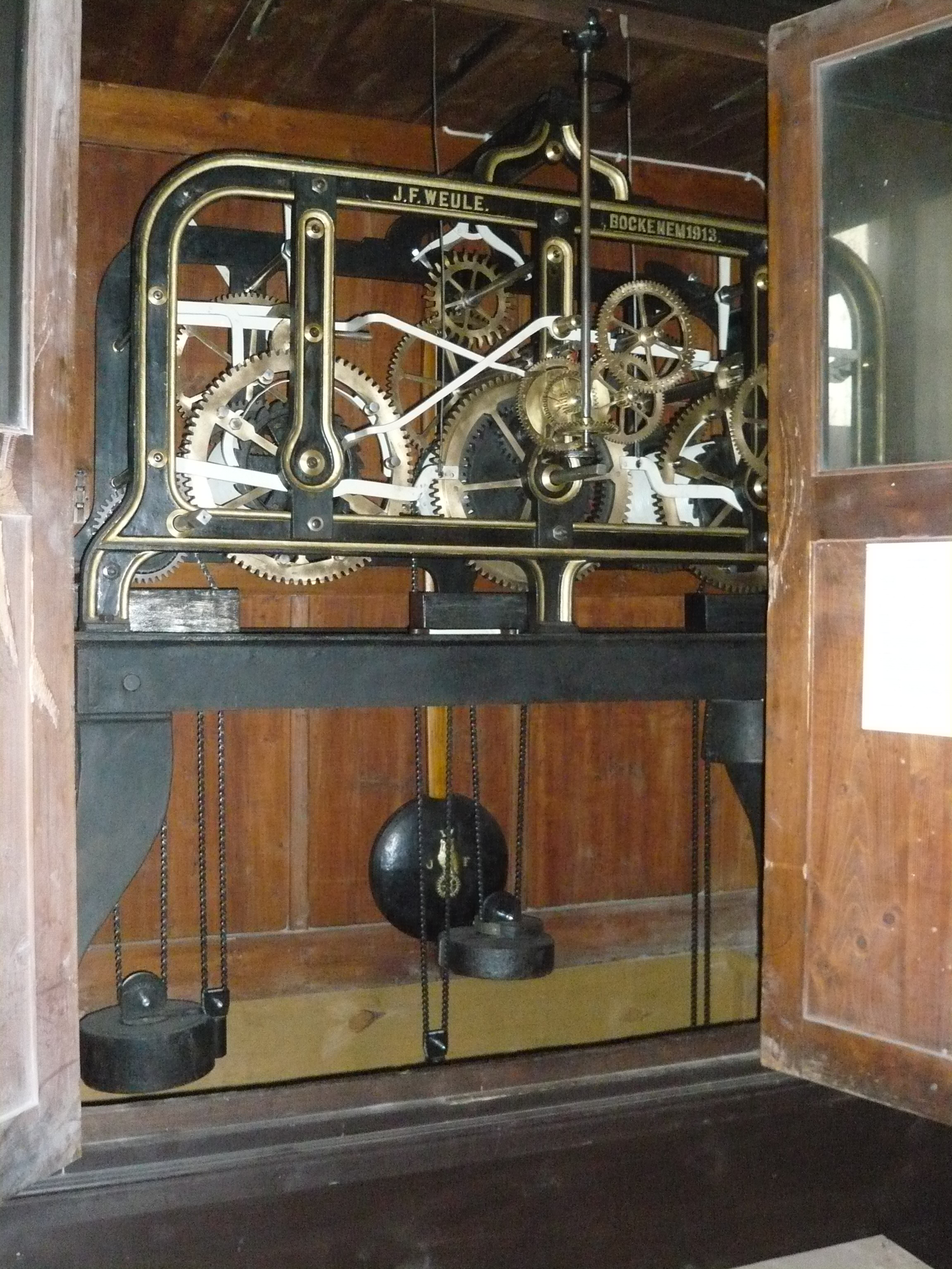 Friedenskirche in Aue-Zelle